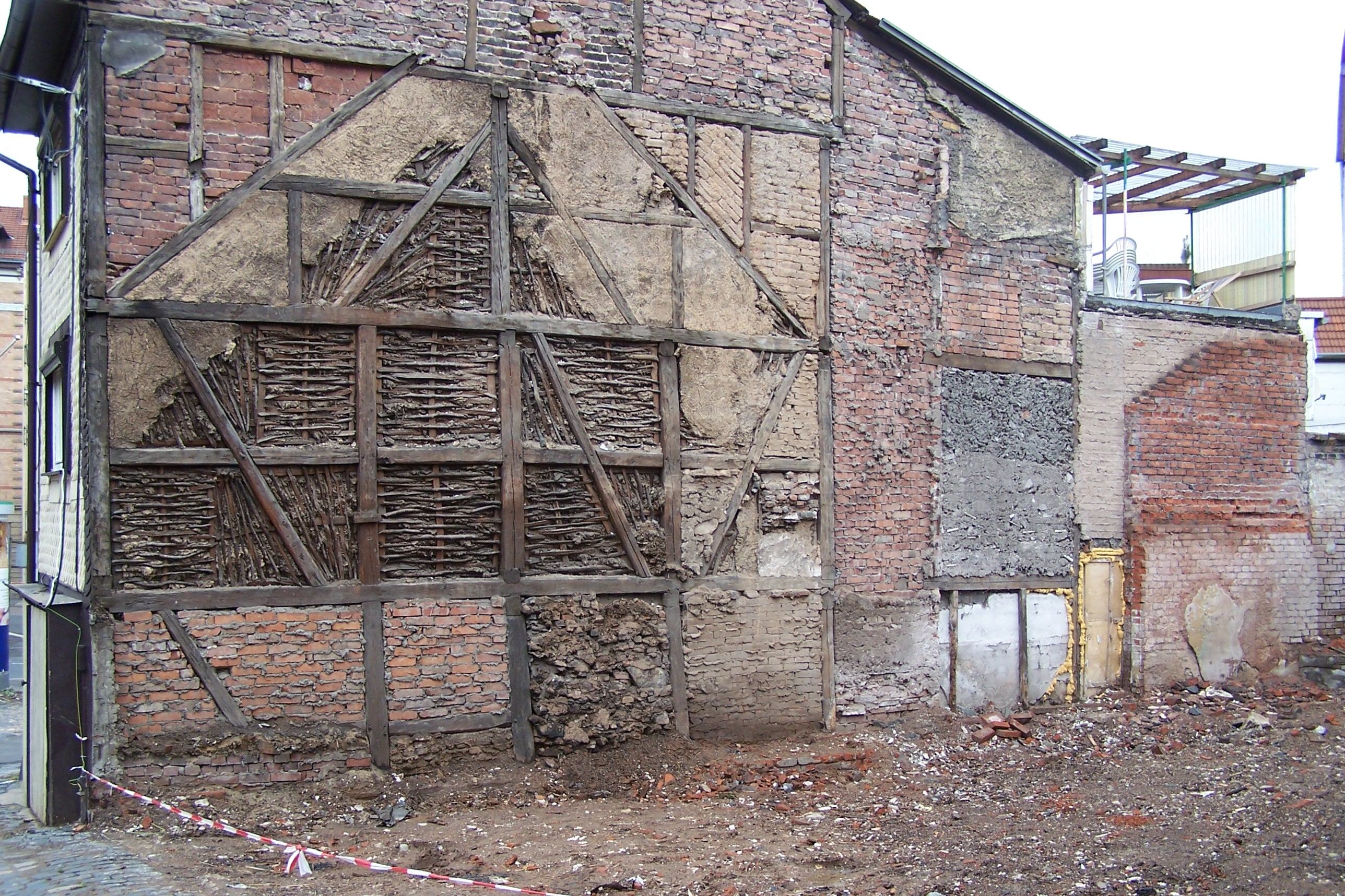 Blick in eine durch Abriss freigelegte Wandpartie in der Sandgasse - das Haus Sandgasse 9 konnte gerettet werden.